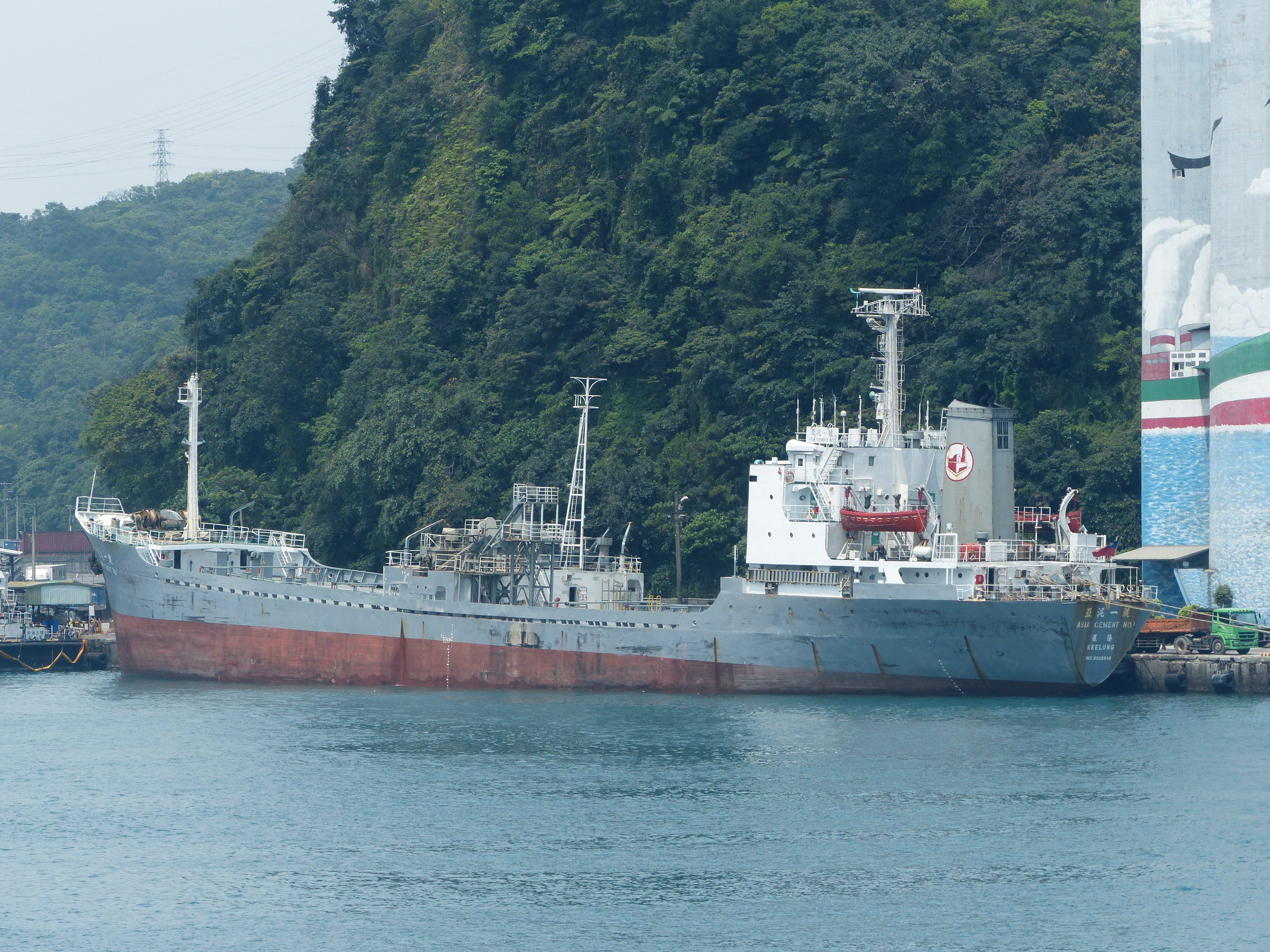 中文（台灣）: 停泊於基隆港西12B碼頭的亞東集團裕民海運中華民國籍水泥船亞泥一號（3917總噸）左舷後方，攝於東5碼頭康定級巡防艦昆明上甲板。